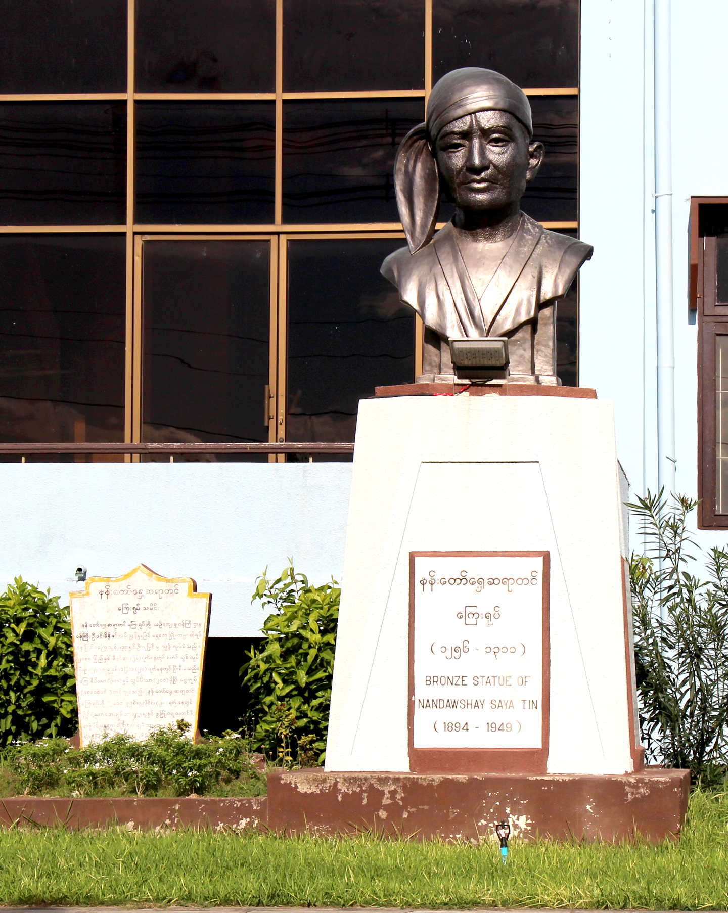 မြန်မာဘာသာ: မန္တလေး အမျိုးသား ကဇာတ်ရုံ ရှေ့ရှိ နန်းတော်ရှေ့ ဆရာတင် ရုပ်ထု